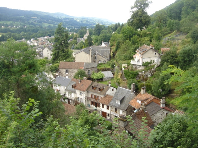 Vue depuis Castelvilh, Vic-sur-Cère